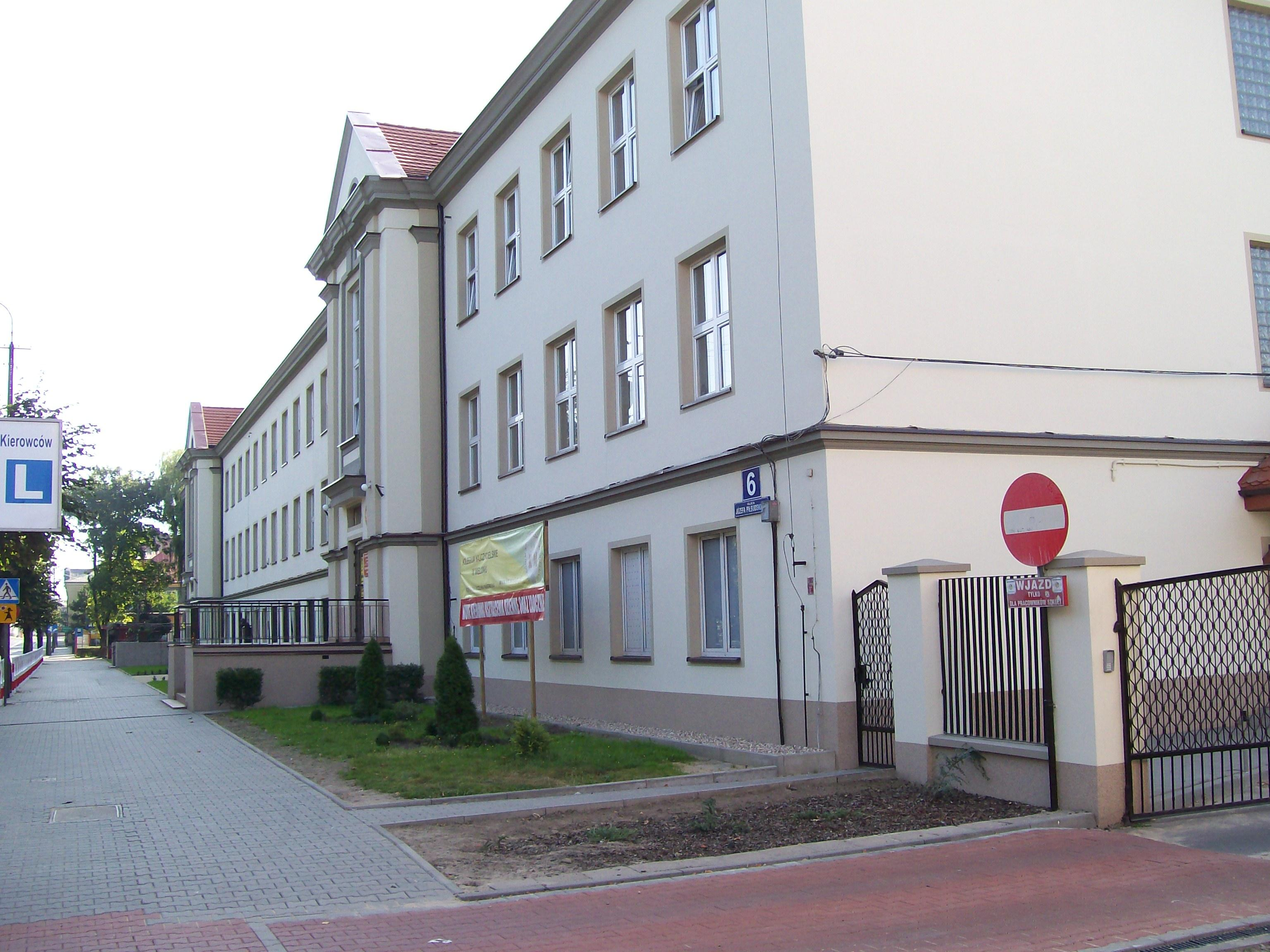 II Liceum Ogólnokształcące w Wieluniu - widok z ulicy Piłsudskiego